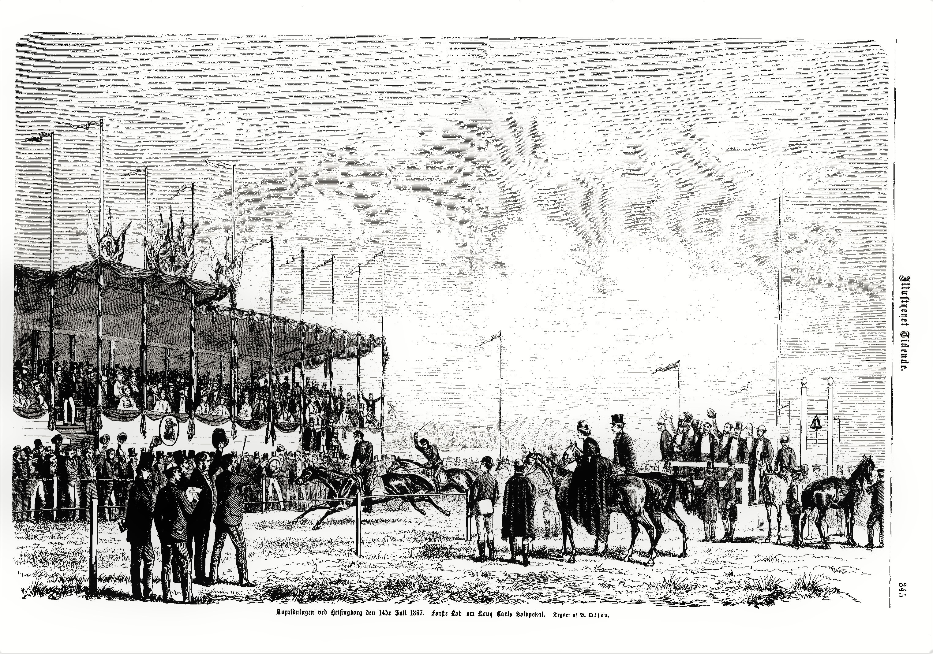 Kapplöpningen vid Helsingborg den 14 juli 1867, avbildad i Illustreret Tidende nr. 408 från den 21 juli 1867. Teckning av Bernhard Olsen.